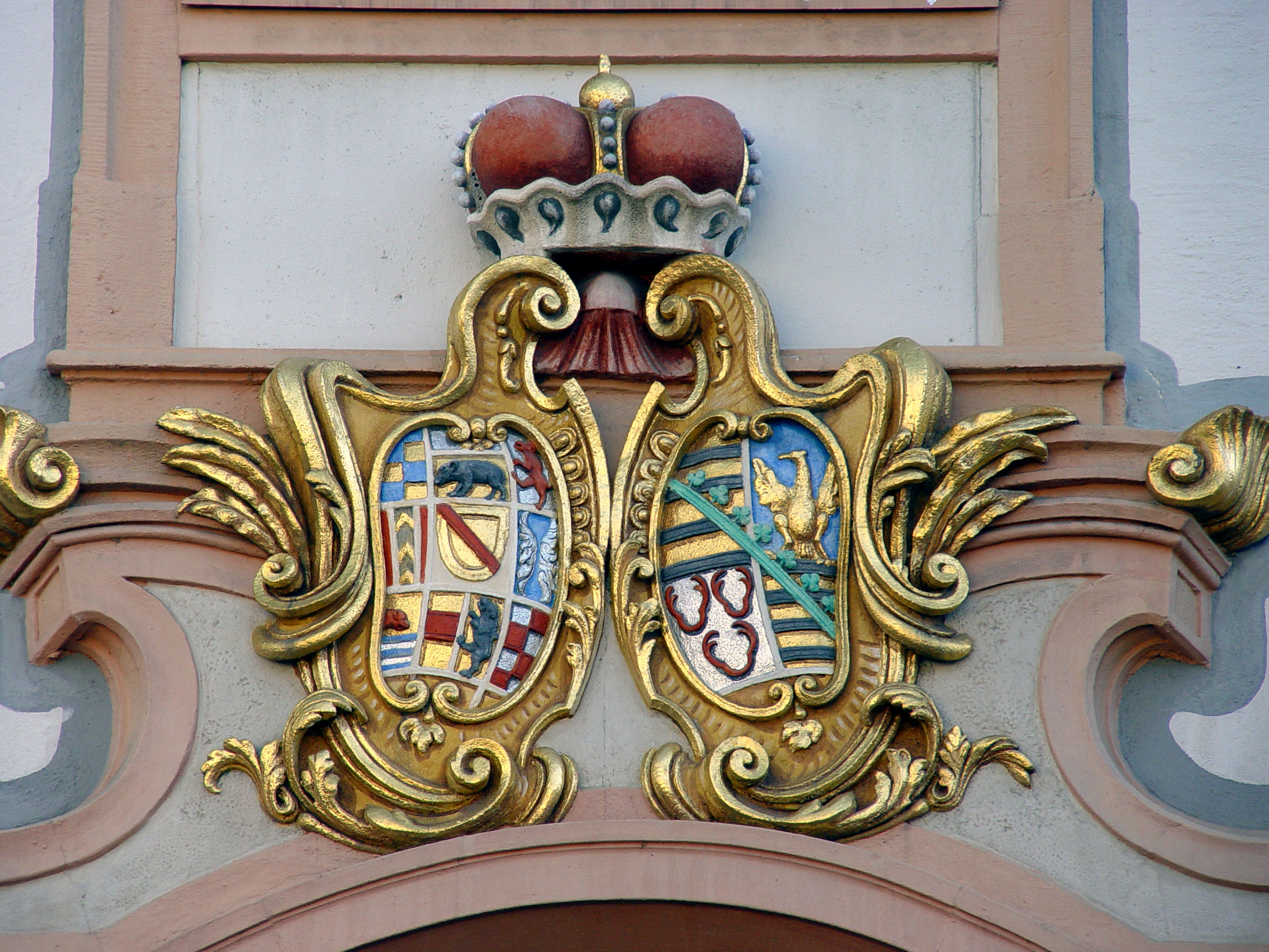 Allianzwappen am Ettlinger Schloss. optisch links: Ludwig Wilhelm Markgraf von Baden-Baden (1655-4. Januar 1707), Reichsfeldherr optisch rechts: Franziska Maria Sibylla Augusta von Sachsen-Lauenburg-Ratzeburg (21. Januar 1675–10. Juli 1733)